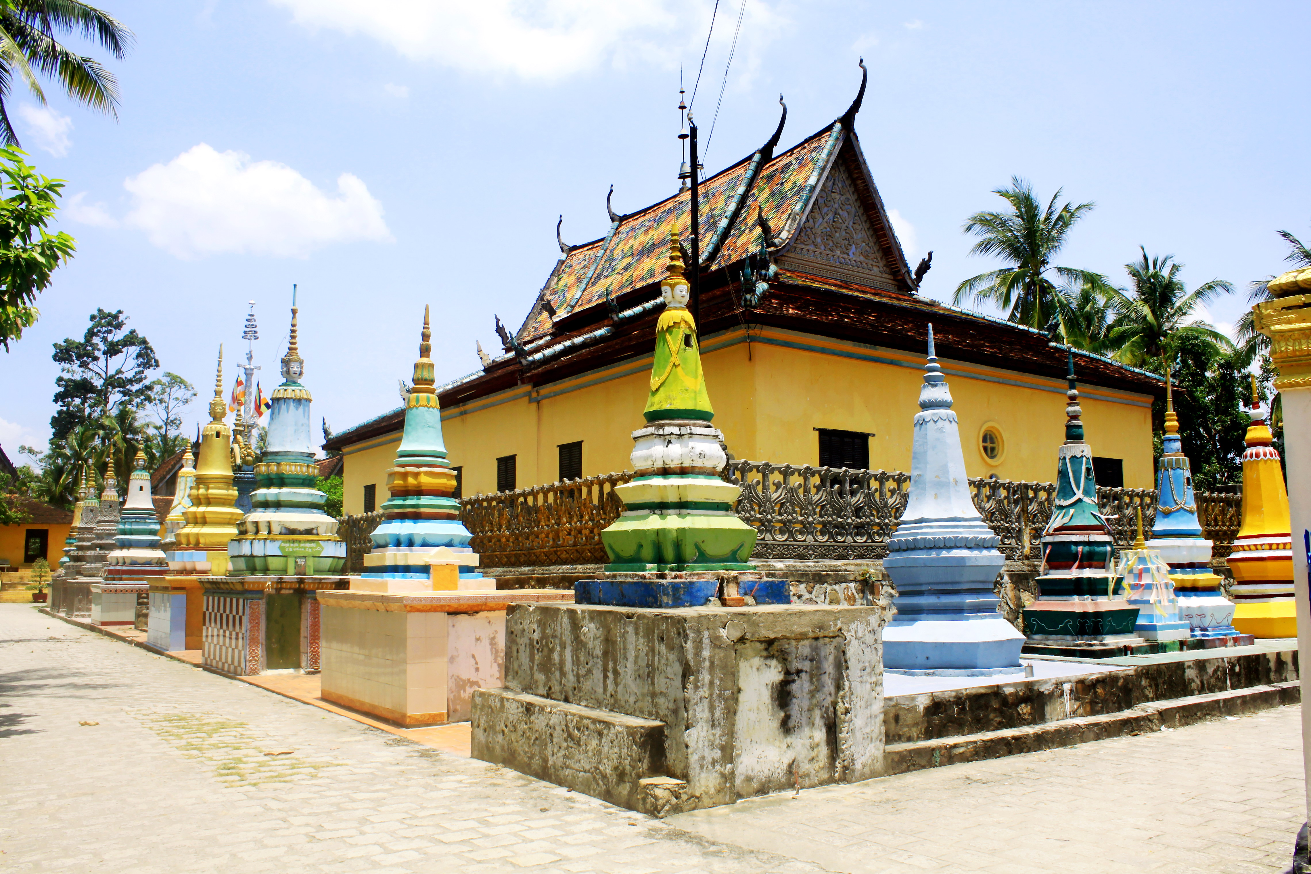 Chánh điện chùa Xà Tón (Xvayton) tọa lạc tại thị trấn Tri Tôn, huyện Tri Tôn, tỉnh An Giang.